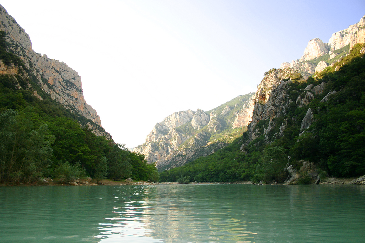 Gorges du Verdon (Verdonschlucht) in Frankreich